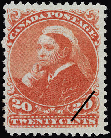 Timbre-poste du Canada 20 cents 1893 éfigie Victoria en deuil